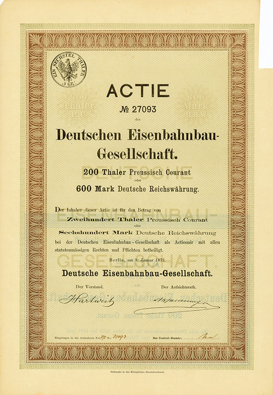 Aktie Nummer 27093 der Deutschen Eisenbahnbau-Gesellschaft, Nennwert 200 Thaler Preussisch Courant entsprechend 600 Mark Deutsche Reichswährung. Die in Berlin zum 1. Januar 1873 datierte Aktie trägt die faksimilierten Unterschriften des Vorstands Emil Hermann Hartwichs sowie des Aufsichtsrats ...